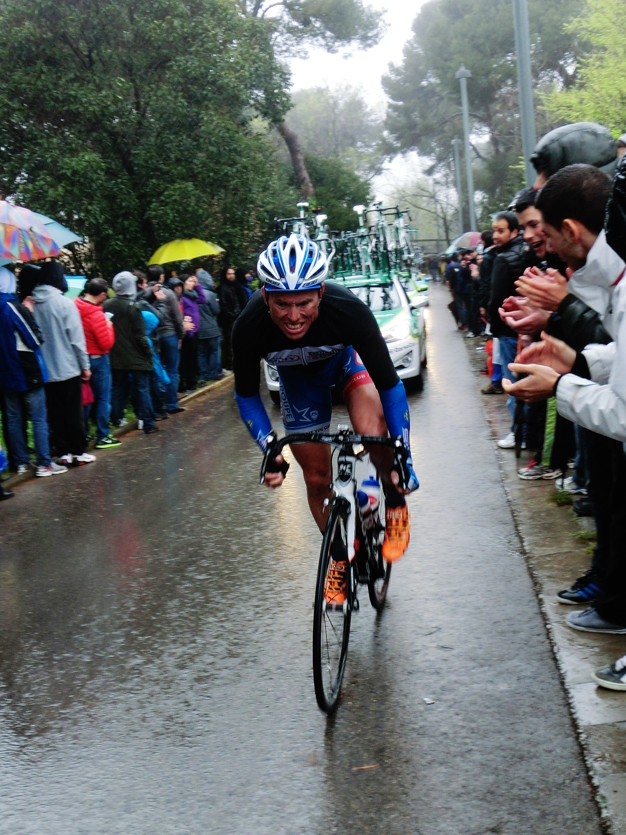 El corredor a Montjuïc (Barcelona, Països Catalans) a la 8a etapa de la Volta Ciclista a Catalunya 2014.